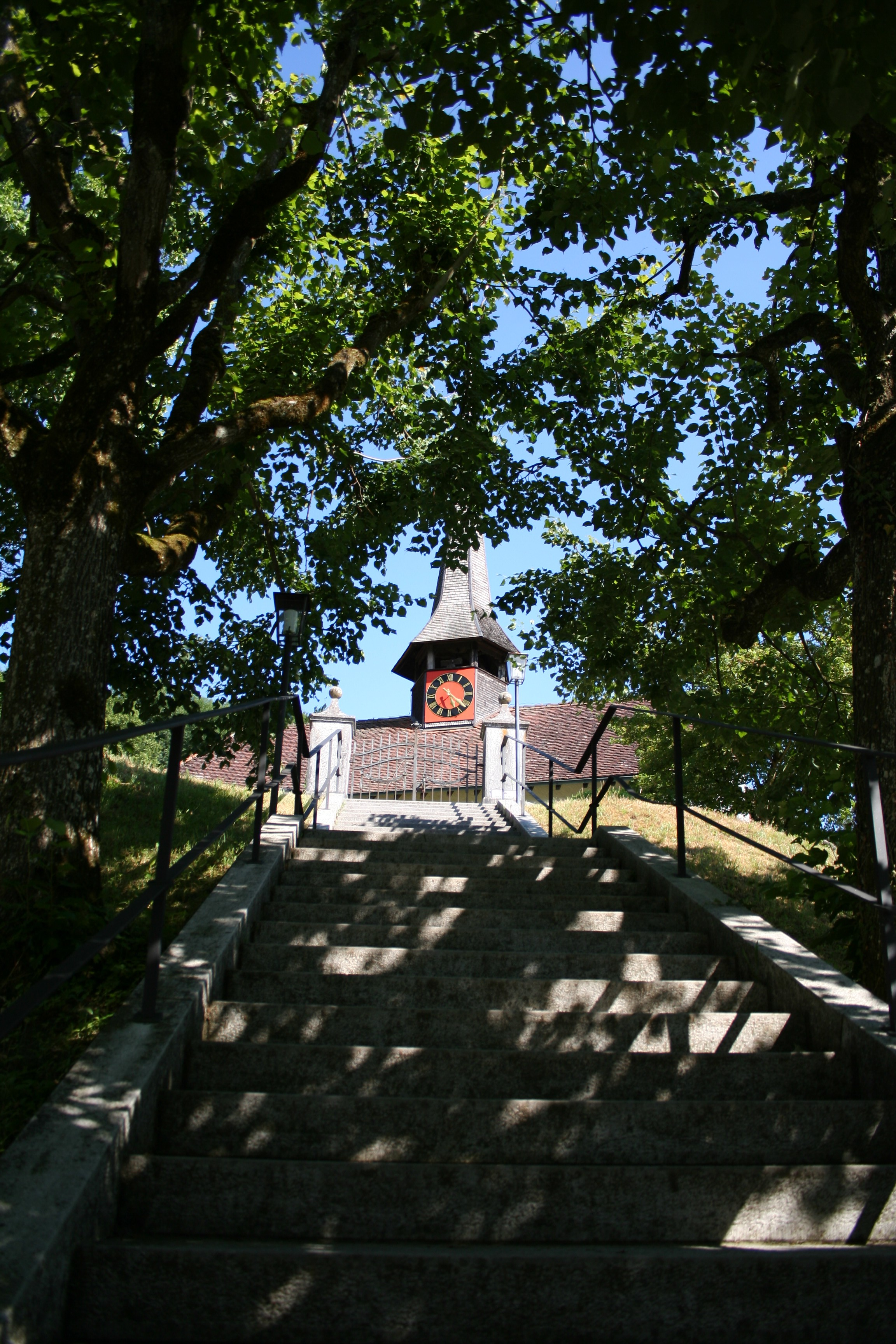 Die reformierte Kirche in Arch, Schweiz, besitzt vorne eine lange Treppe, welche mit einer Allee versehen ist.